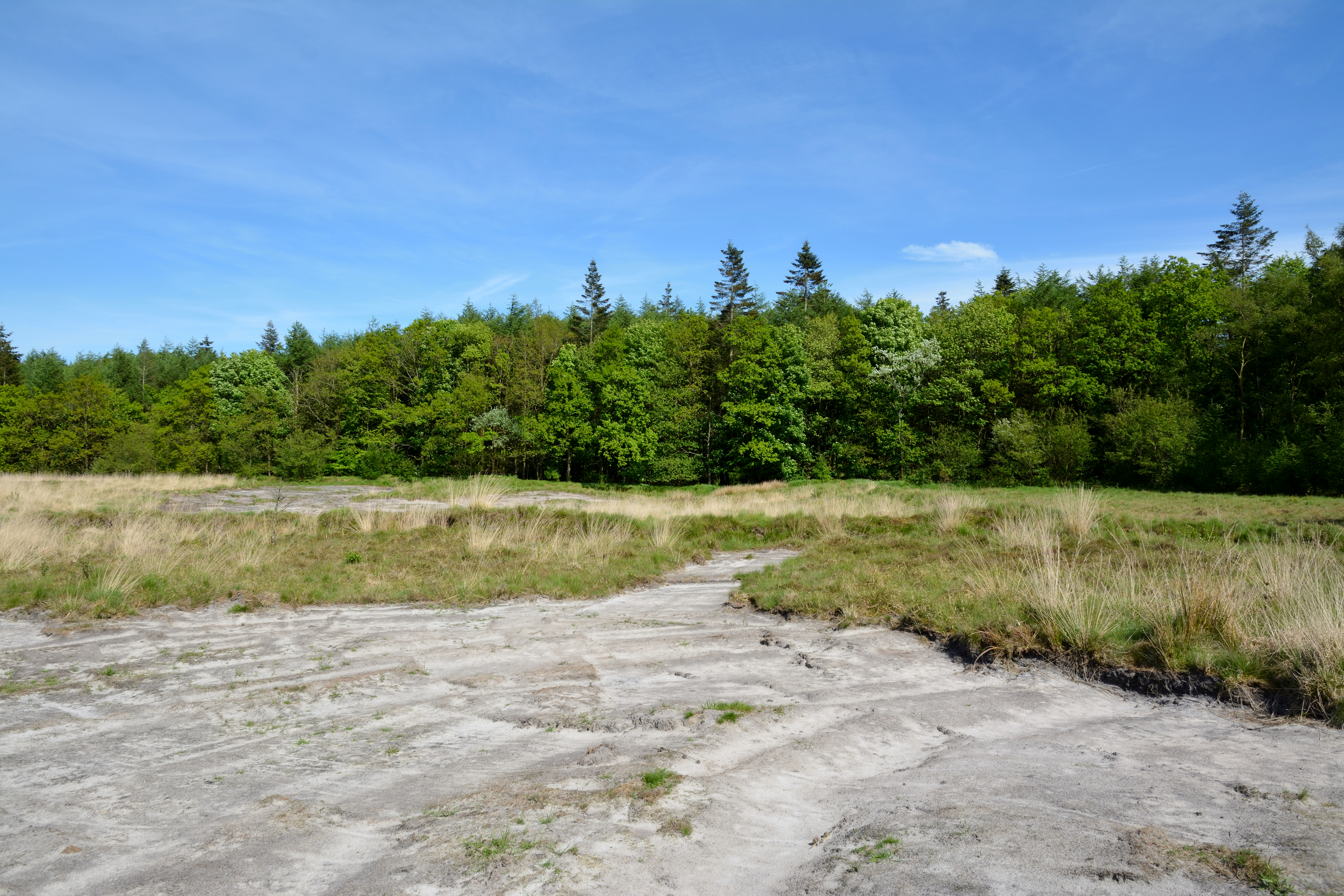 Impressionen vom Naturerlebnisraum "Mühlenau/Mildstedter Tannen" in Mildstedt. Abgeplaggte Heidefläche.